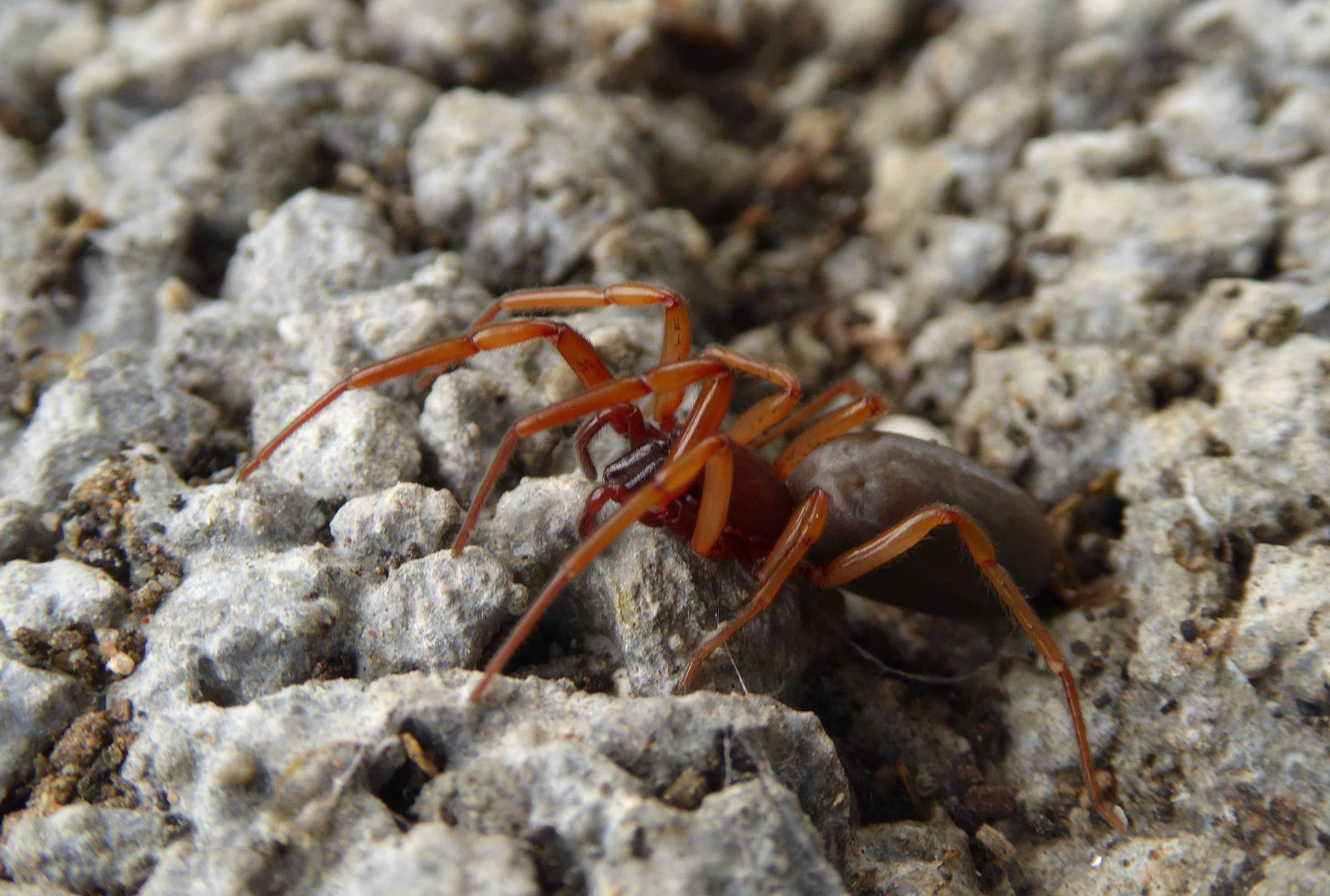 Spinne „Großer Asseljäger“ (Dysdera crocata) auf einem Beton-Dränstein in Hettensen.